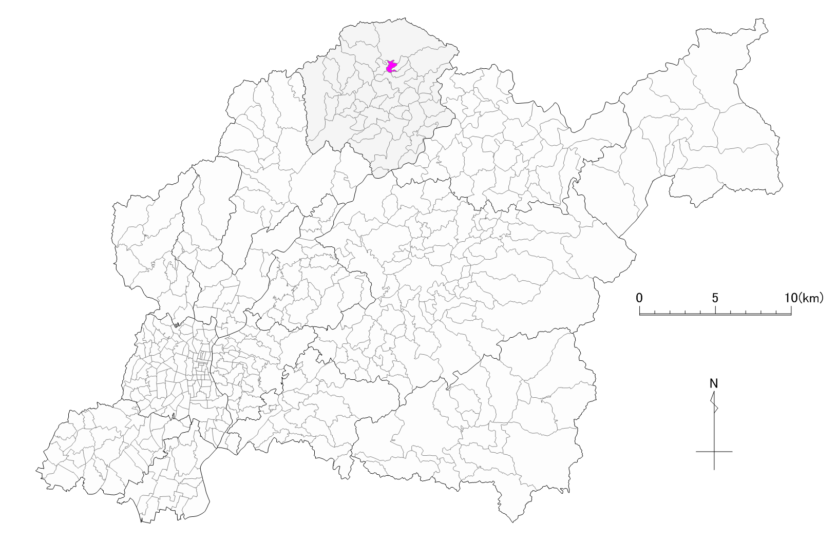 豊田市雑敷町位置図